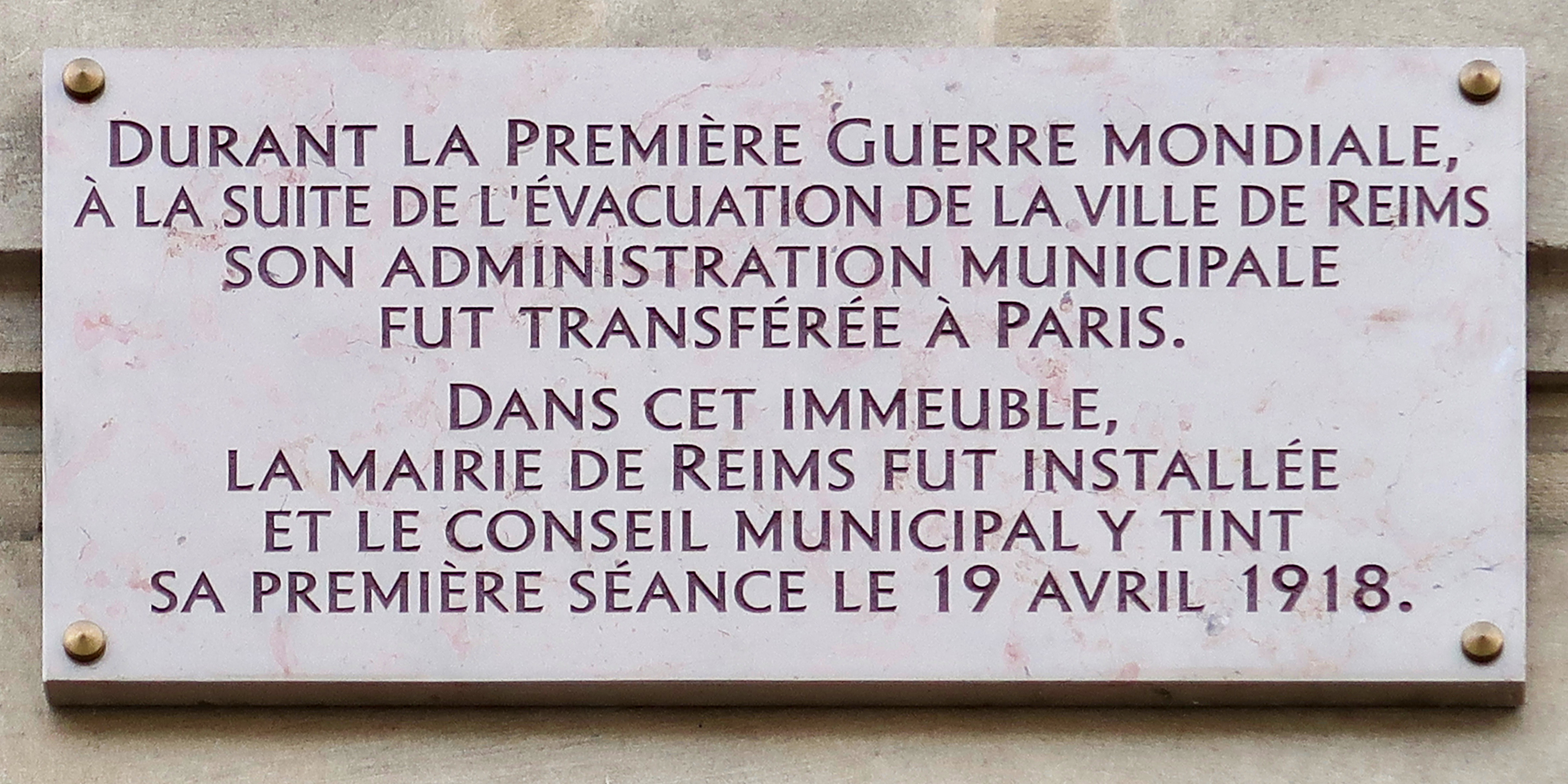 Plaque commémorant la municipalité de Reims en exil pendant la Première Guerre mondiale, 19 avenue de l'Opéra (Paris, 1er).